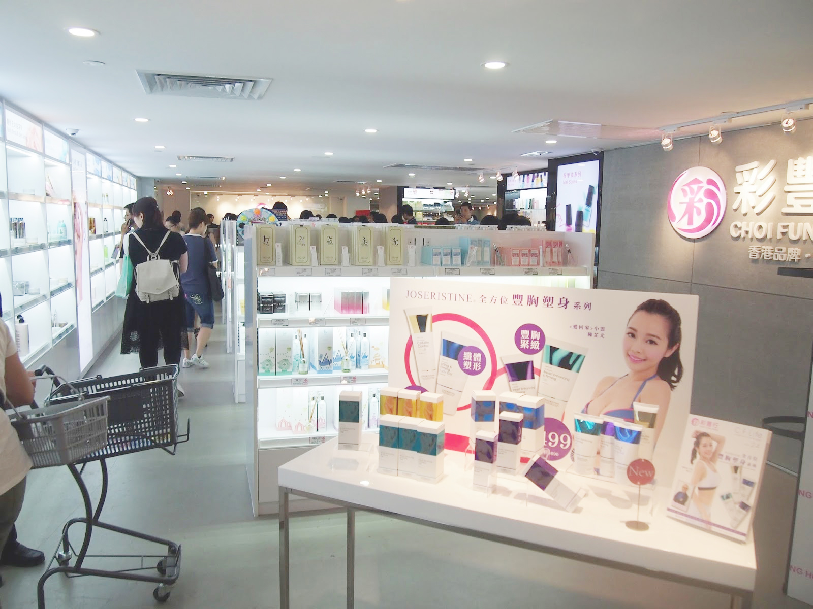 旺角旗艦店